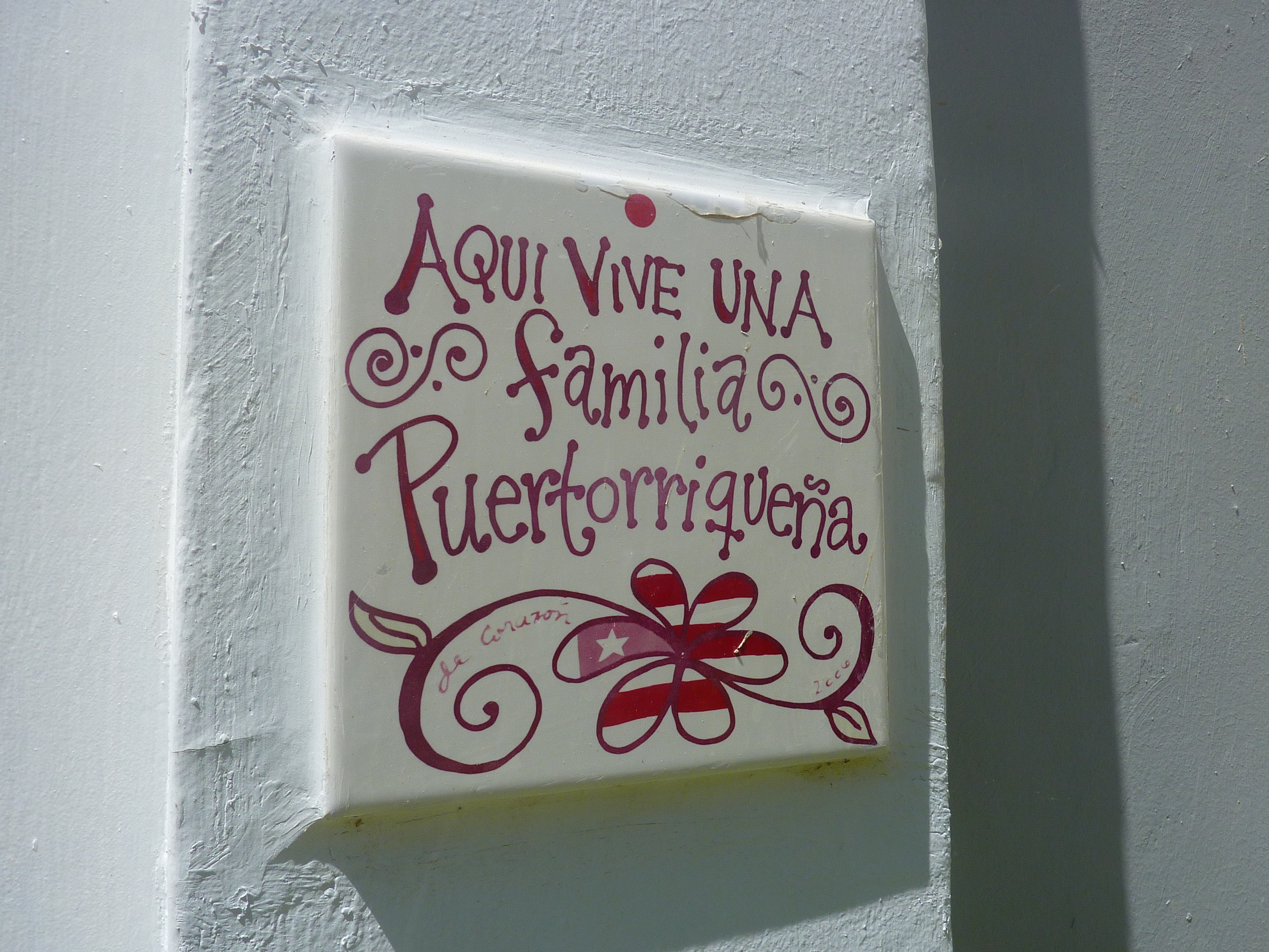 Aqui vive una familia puertorriqueña 2006